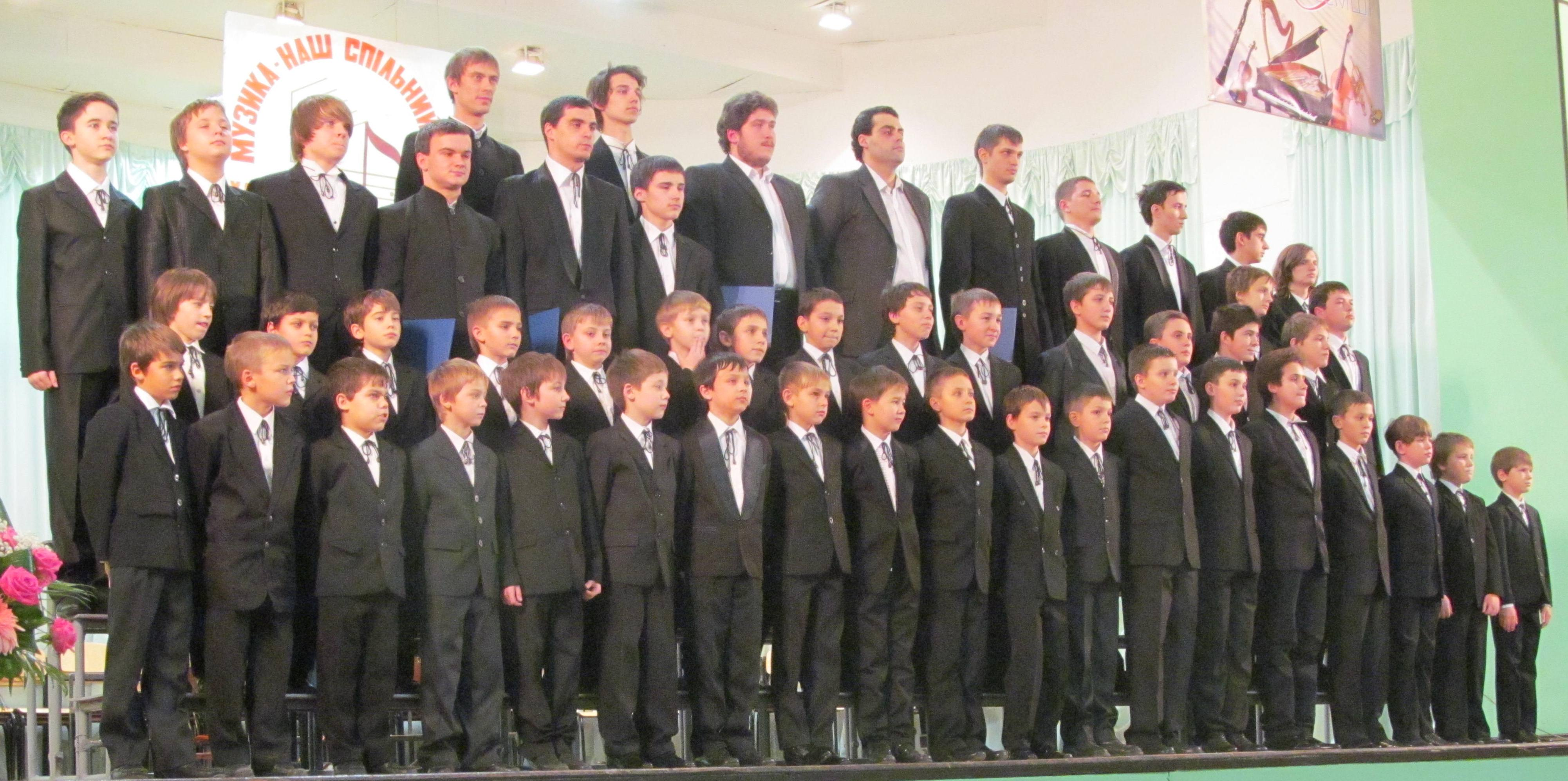 Хор мальчиков Харьковской средней специализированной музыкальной школы-интерната (2013)